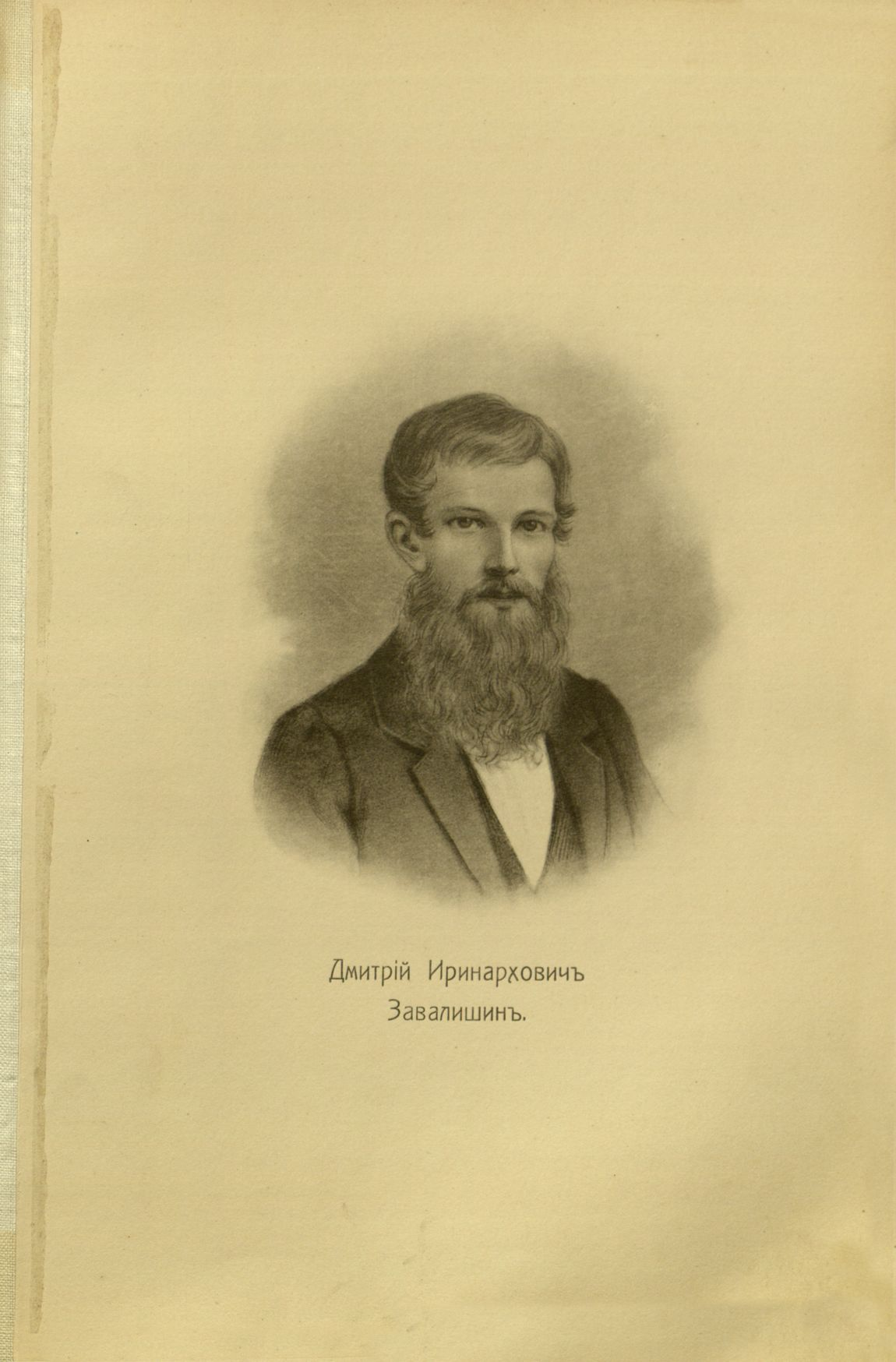 Головачев, П. М. Декабристы : 86 портретов, вид Петровского завода и 2 бытовых рисунка того времени. - М., [1906] Dmitriy Zavalishin